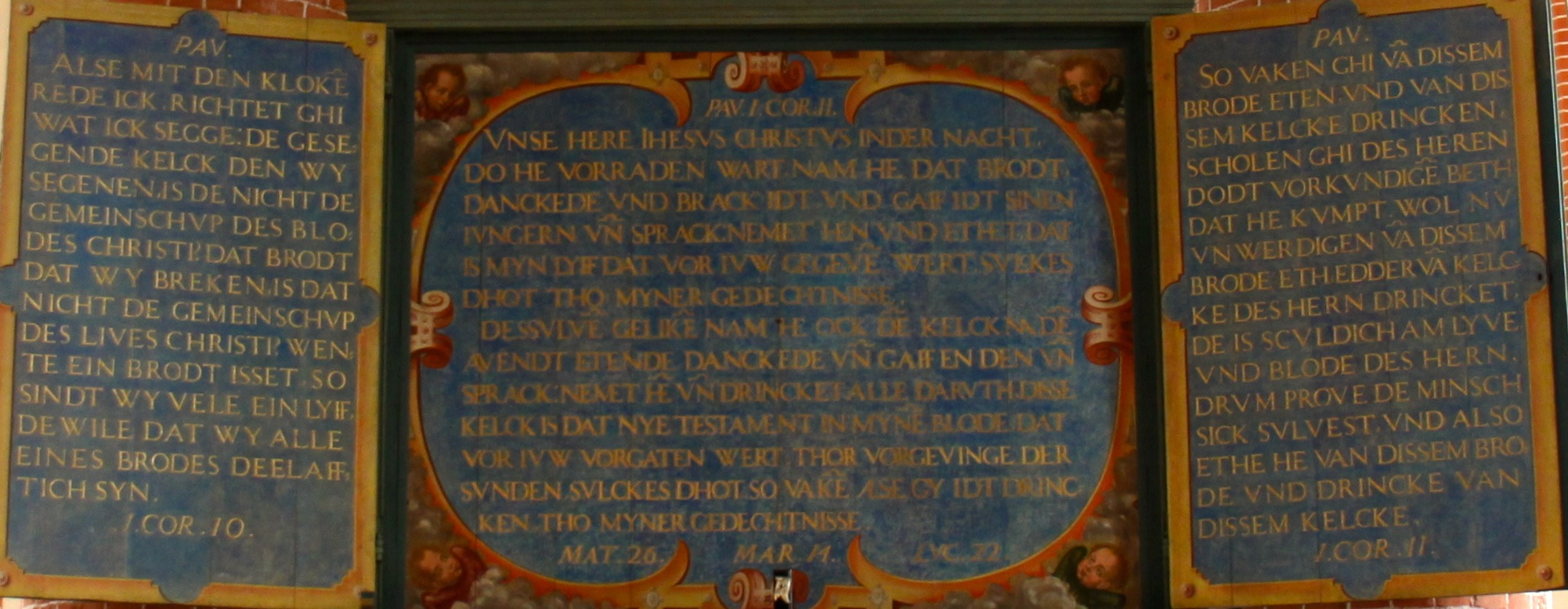 Altartext der Ludgerikirche Norden (Ostfriesland)